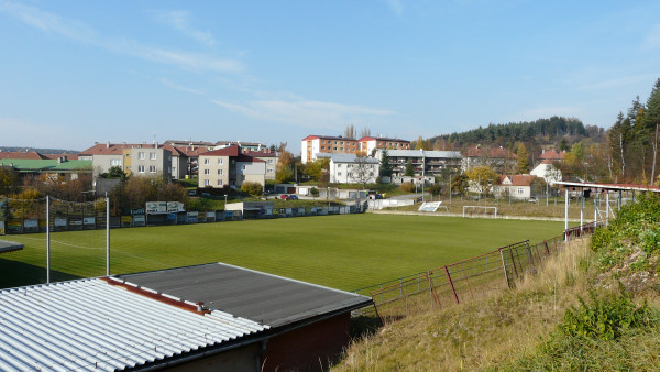 Staré fotbalové hřiště v Konici